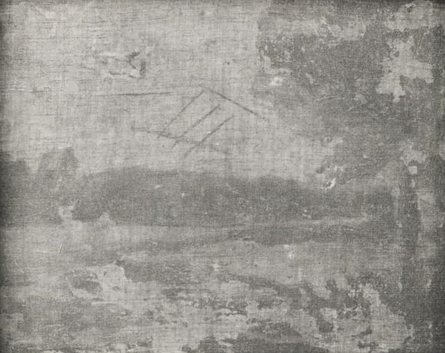 Landschap met bomenrij. Landscape with Row of Trees